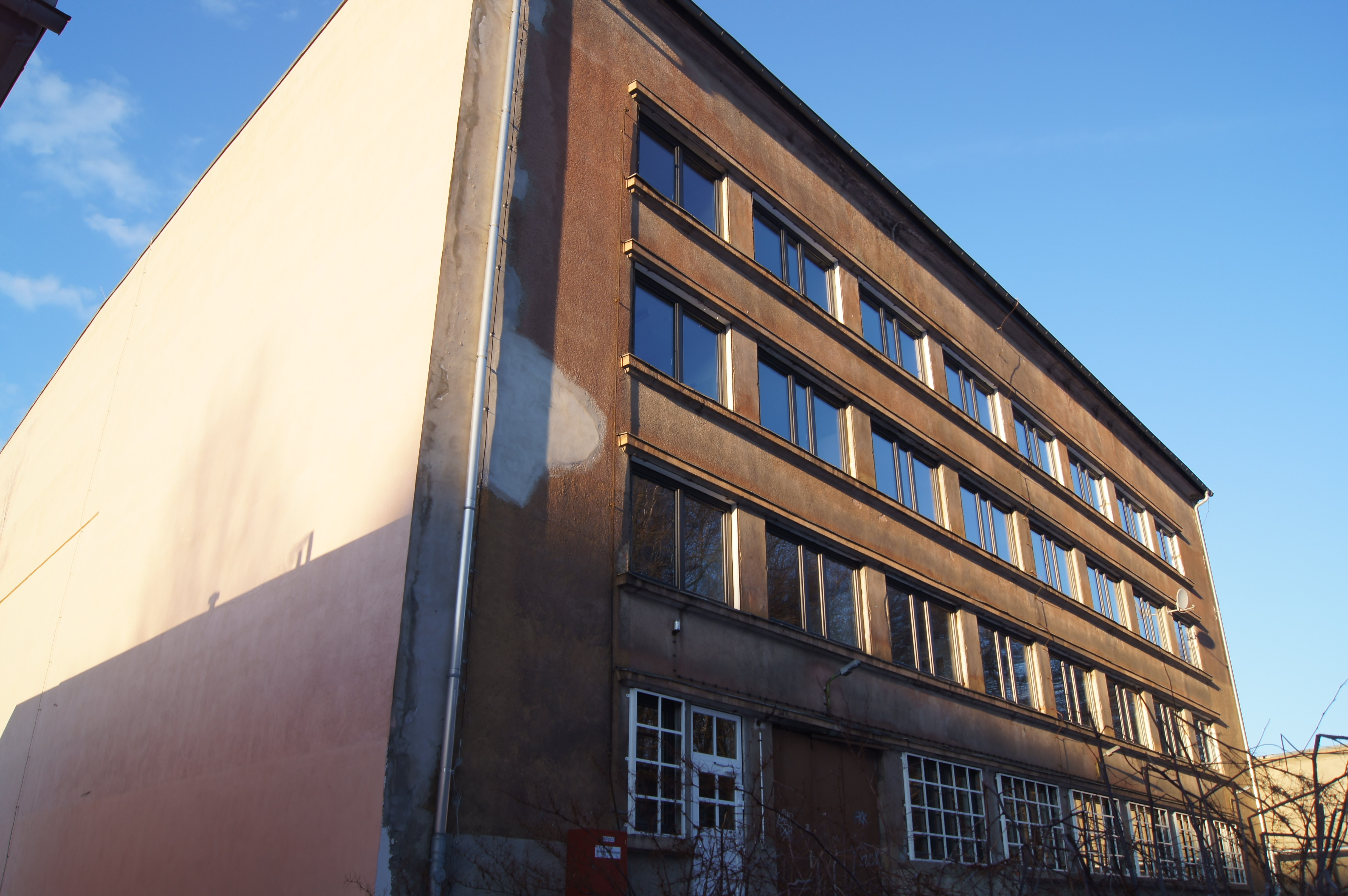 Rückseite des Museums, welche ursprünglich die Vorderseite des Gebäudes (Hochgarage) darstellen sollte.